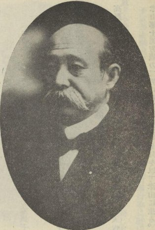 岡玄卿（1852-1925）